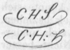 Monogramm von Carl Hermann Schmolze aus Nagler: Die Monogrammisten, Band II., Nr. 197, S. 68